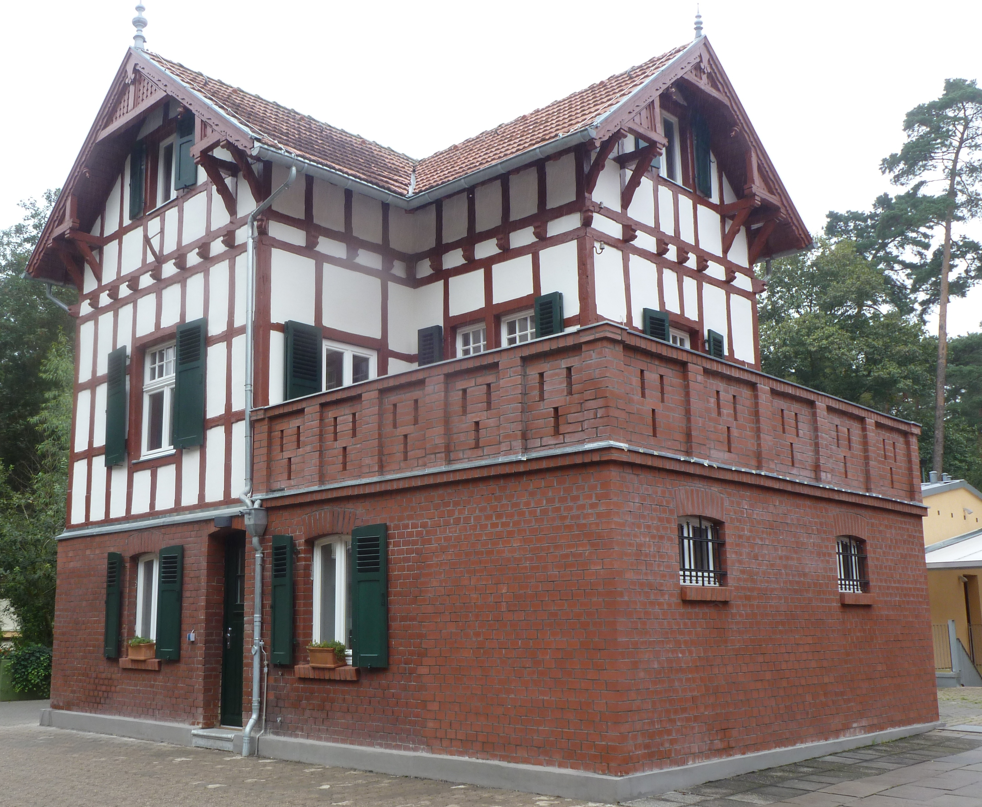 Tierheim Köln-Dellbrück, Iddelsfelder Hardt, Denkmal Nr. 666